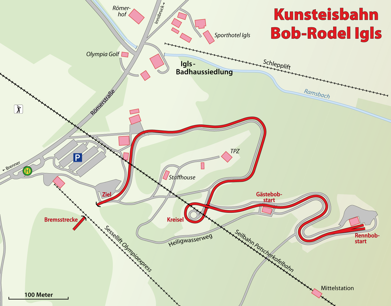 Karte der Kunsteisbahn Bob-Rodel Igls